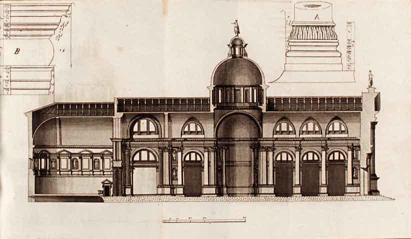 Andrea PALLADIO, 1508-1580. Le fabbriche e i disegni di Andrea Palladio; raccolti ed illustrati da Ottavio Bertotti Scamozzi. In Vicenza: per Giovanni Rossi, 1796. v.1, v.4.